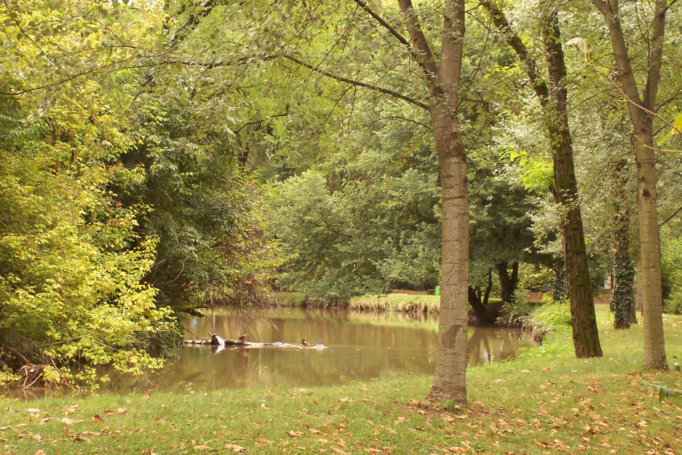 Milano, parco Lambro